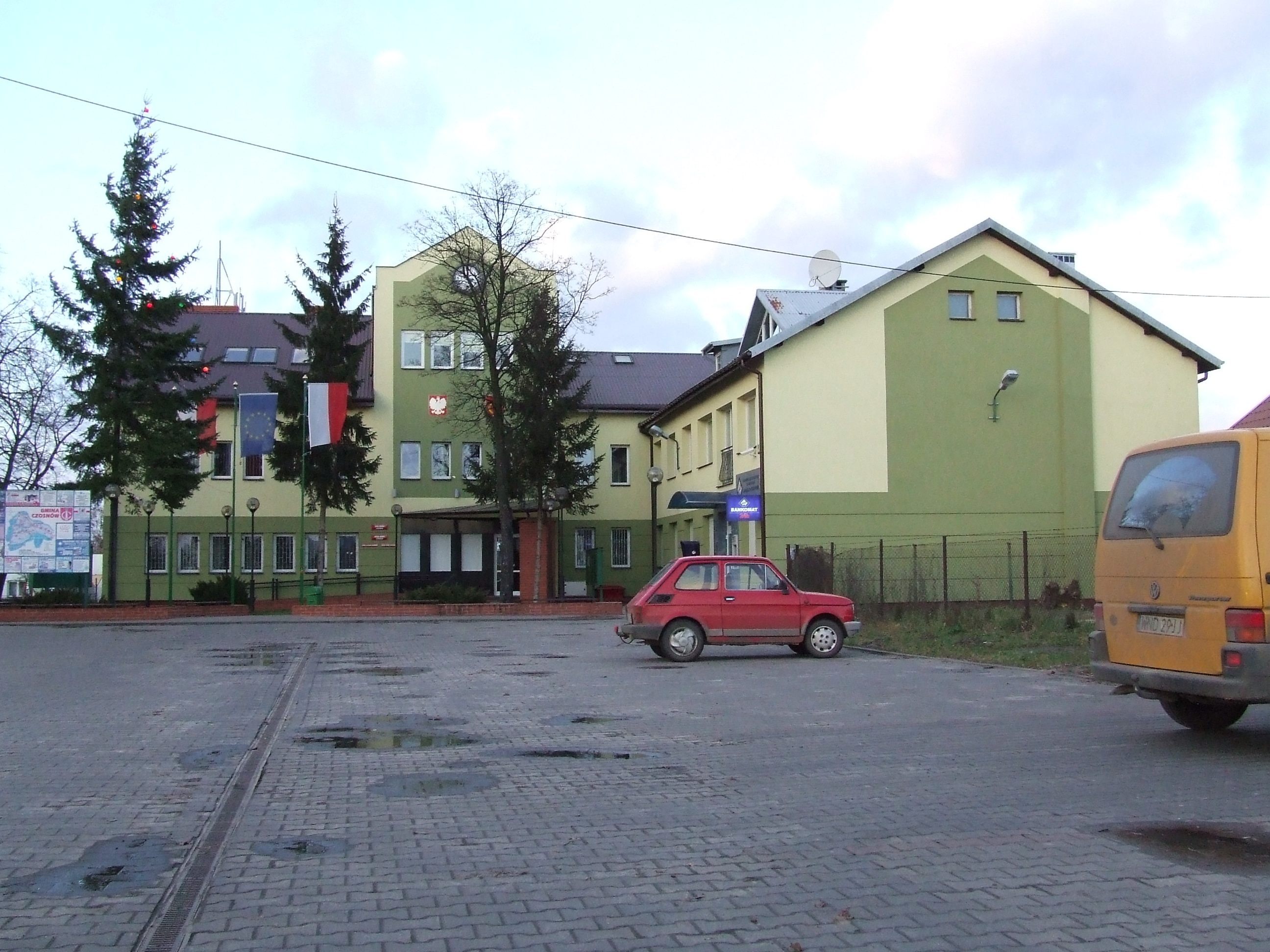 Urząd Gminy Czosnów